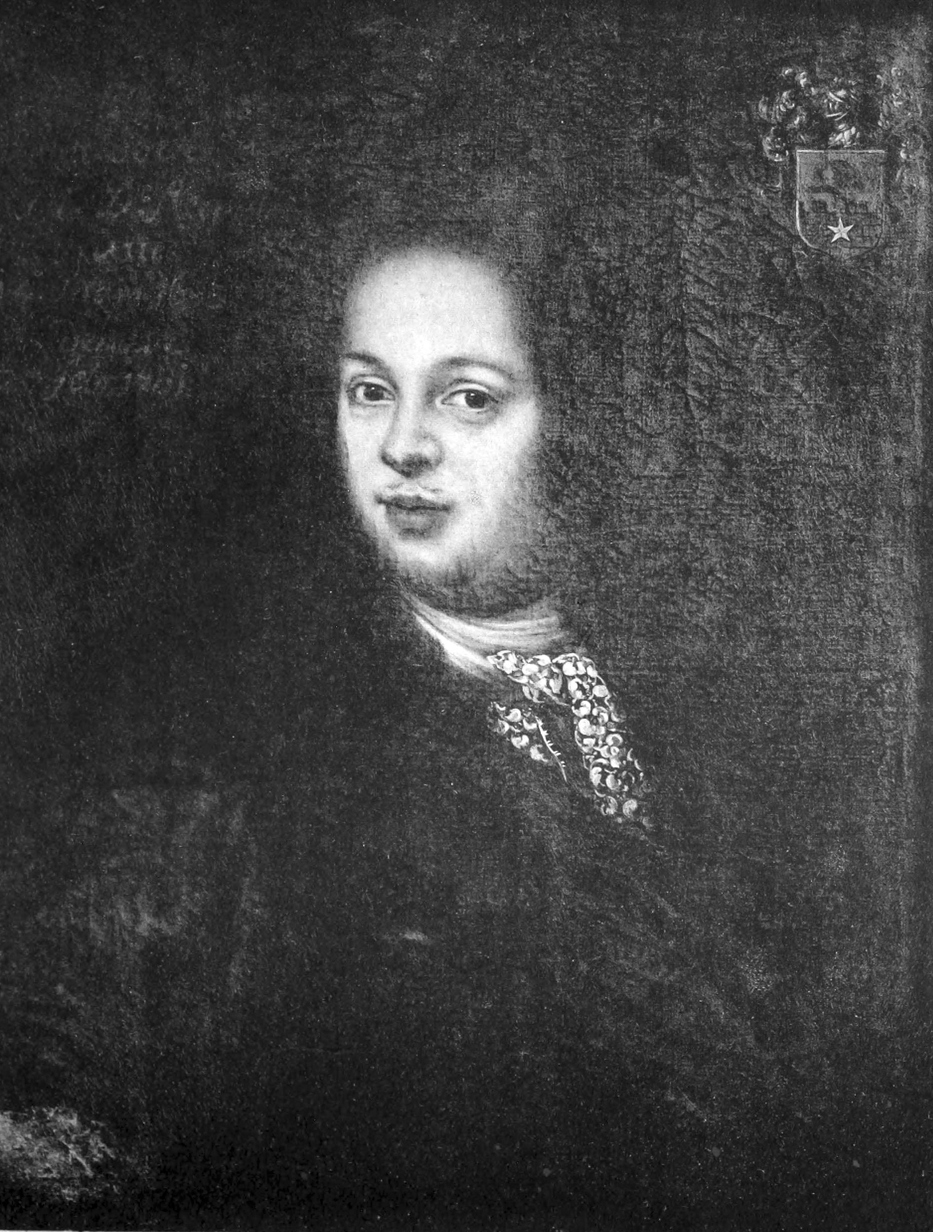 Johan Martin Rothlöben (1657-1701). Medelålders man, bröstbild, fas, hufvudet t. h., kroppen t. v., med bruna ögon, små underrakade mustascher, svart allongeperuk. Hvit lindad halsduk med nedhängande spetsändar, brunt draperi. Mörk bakgrund, t. h. svårläst inskrift t. v. vapnet. Olja på duk, 95 x 82 ctm., af okänd mästare. Medicinalstyrelsen. Eich. o 13. PI. XIII.